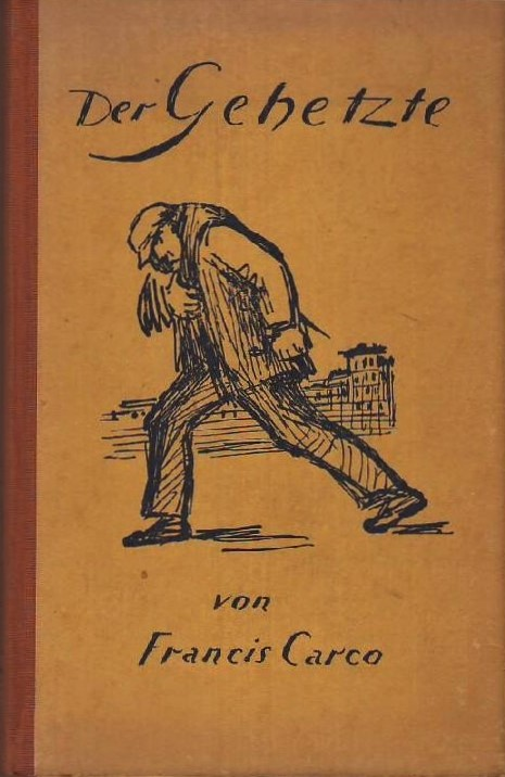 Francis Carco, Der Gehetzte. Roman. Deutsch von F. A. Angermayer, Verlag Die Schmiede, Berlin, 1924 (Die Romane des XX. Jahrhunderts). Einbandzeichnung von Marcel Słodki